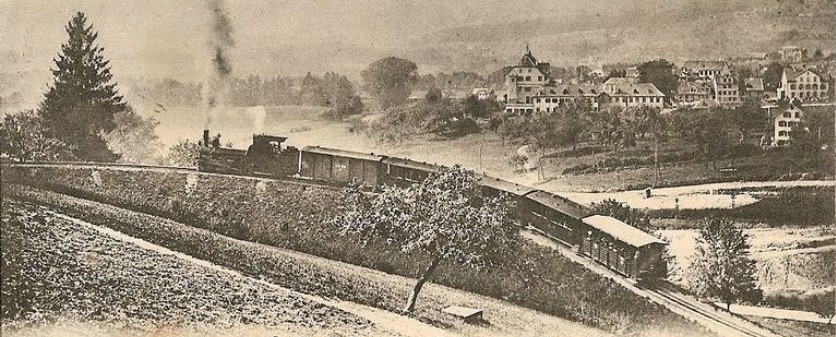 Zug der Appenzeller-Strassenbahn (ASt) in der Ruckhaldenkurve, im Hintergrund Vonwil bei St. Gallen